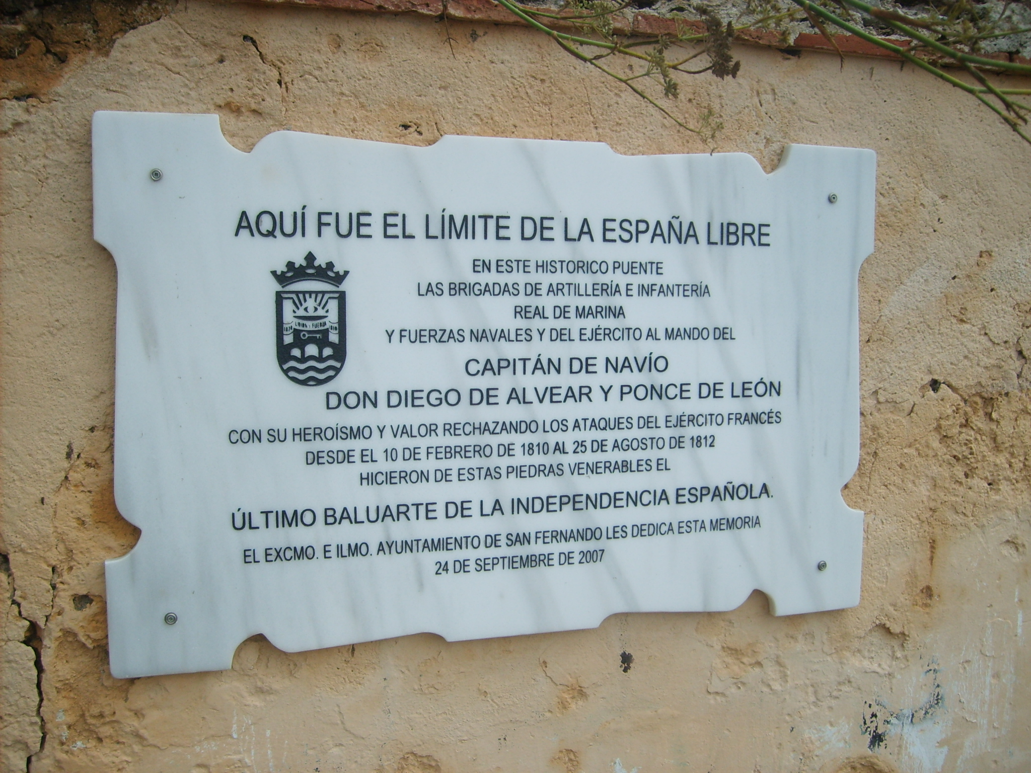 Placa conmemorativa en el Puente Zuazo sobre la Guerra de la Independencia Española en San Fernando (Cádiz, Andalucía).